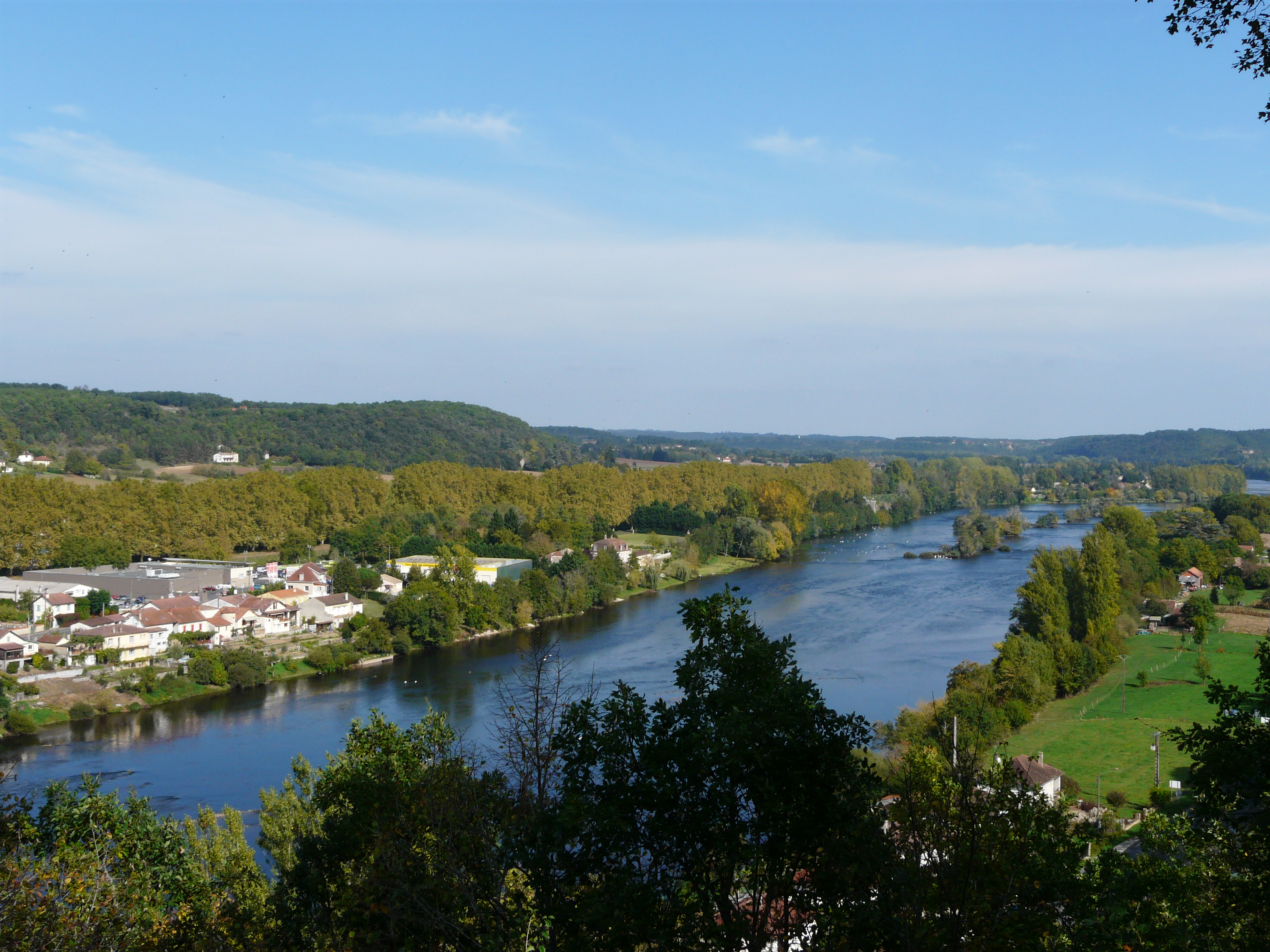 La Dordogne sert de limite entre les communes de Lalinde (à gauche) et Couze-et-Saint-Front (à droite), département de la Dordogne, France. Vue prise en direction de l'amont.